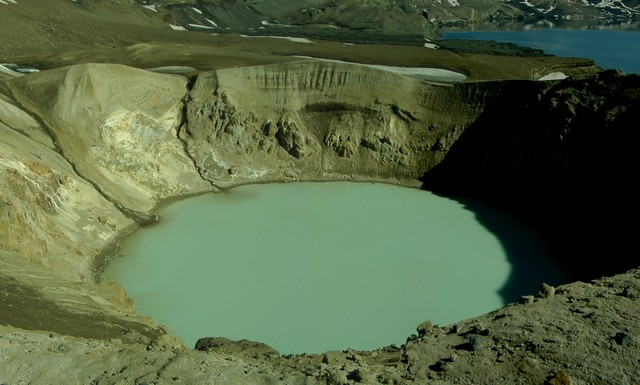 Craterlake Viti in Iceland in region Askja